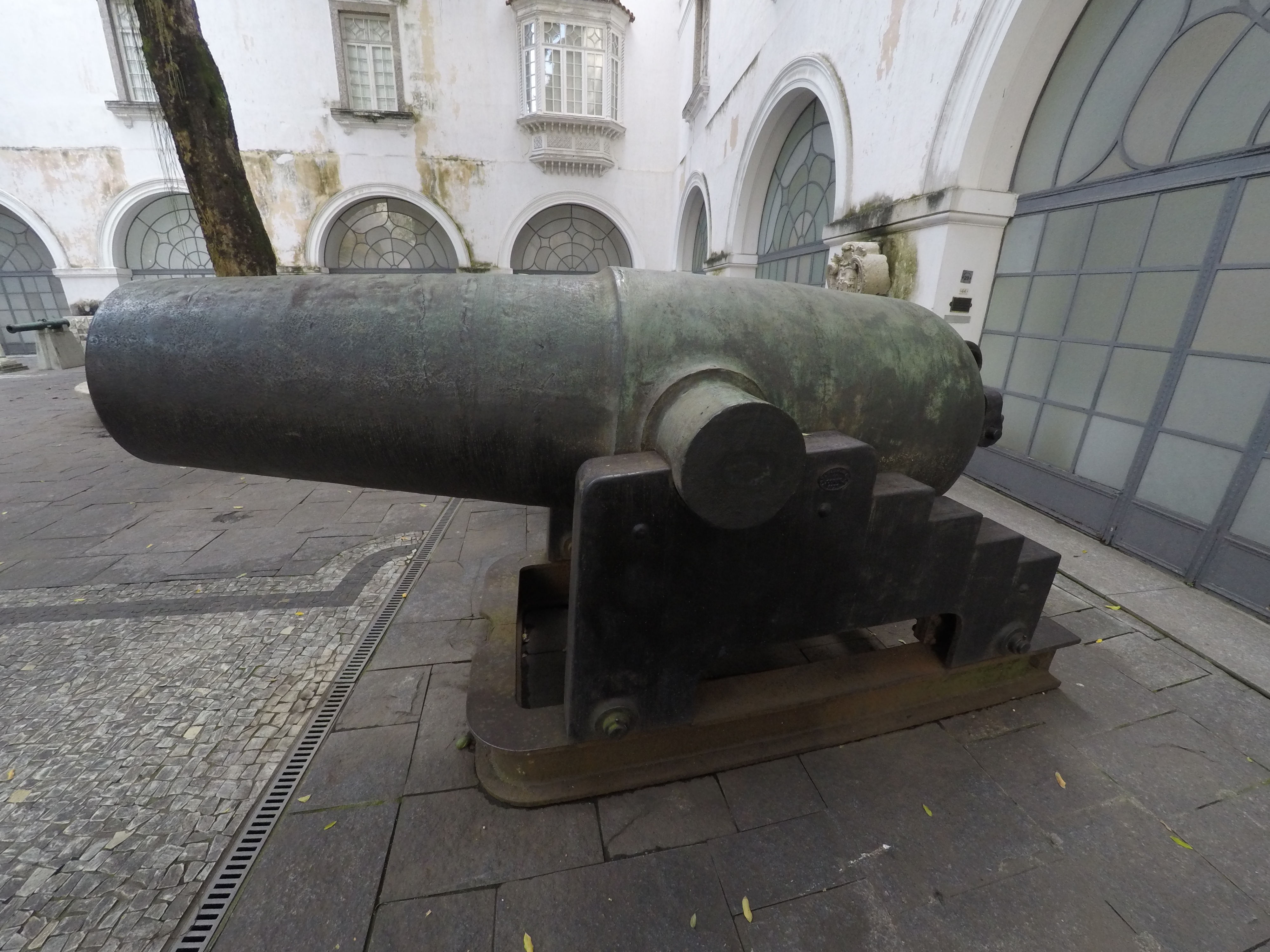 Canhão El cristiano tomado pelo Brasil como troféu de guerra durante a Guerra do Paraguai disponível no Pátio dos Canhões do Museu Histórico Nacional no Rio de Janeiro